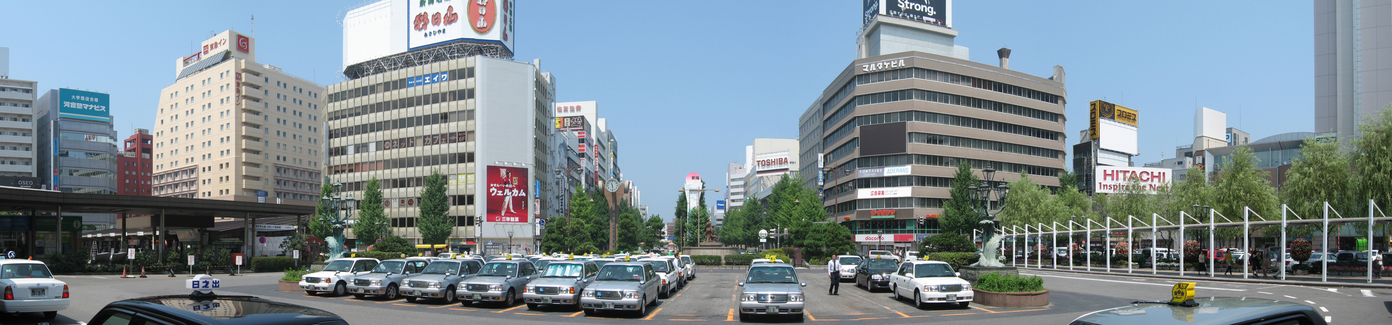 新潟市中央区。新潟駅前地区のパノラマ画像。